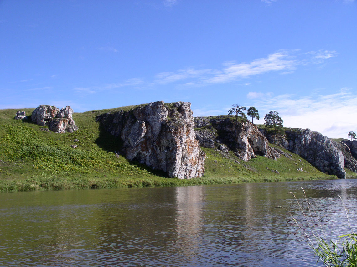 Камень Слободский на р. Чусовая. Окрестности села Уткинская Слобода.